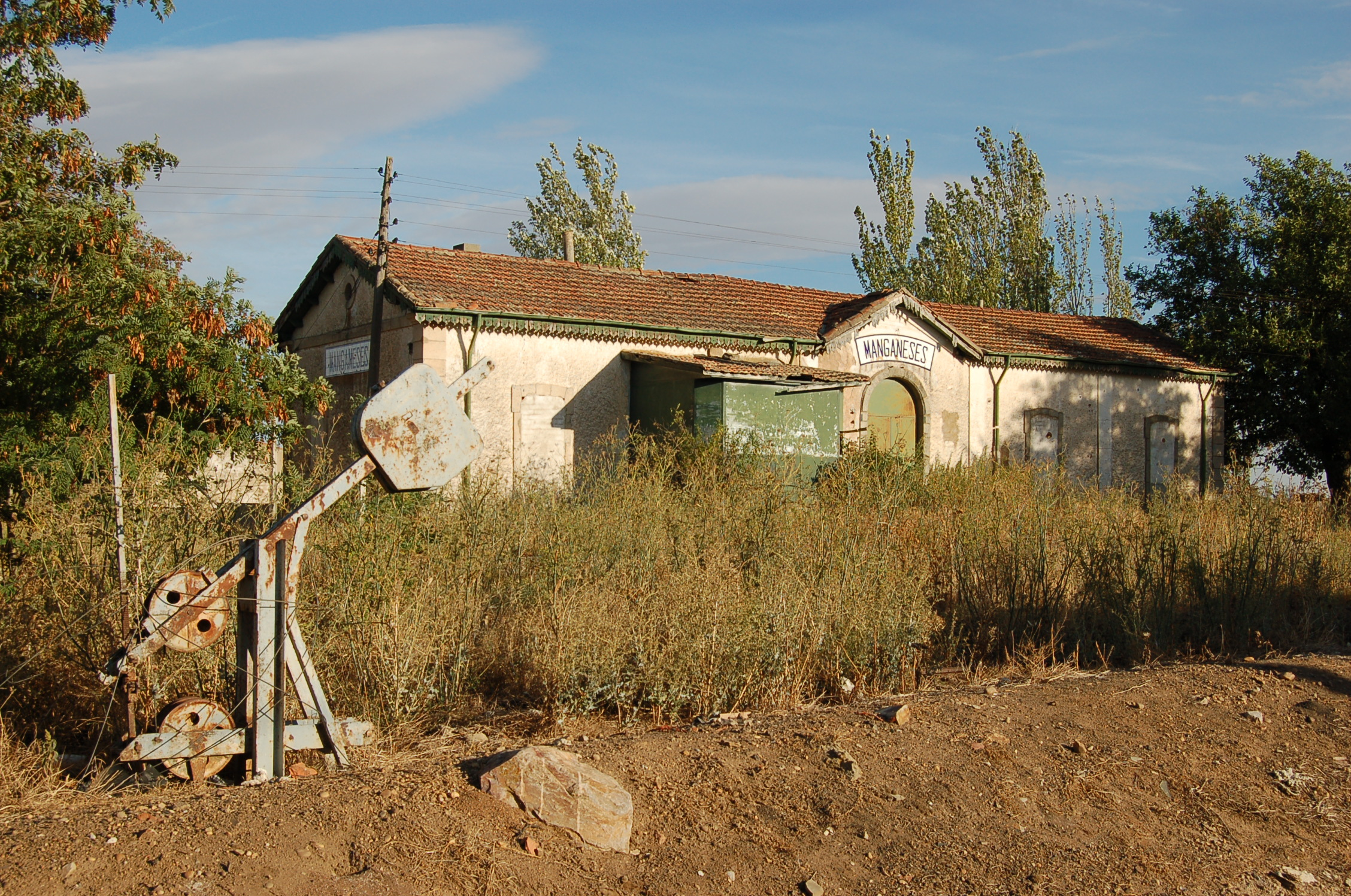 Estación tren Manganeses de la Lampreana